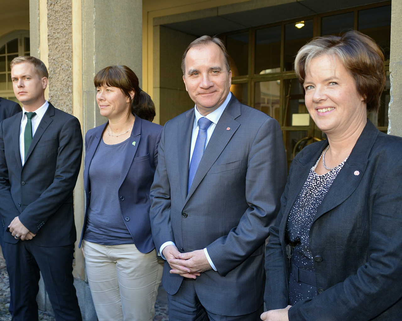 De rödgröna partiledarna (minus vänsterpartiet) börjar regeringsförhandlingarna den 15 september 2014.